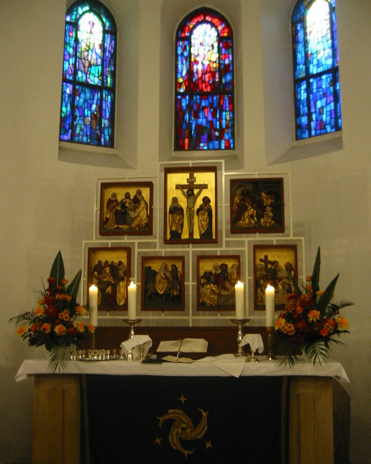 Altar Klosterkirche Marienkirche Barsinghausen